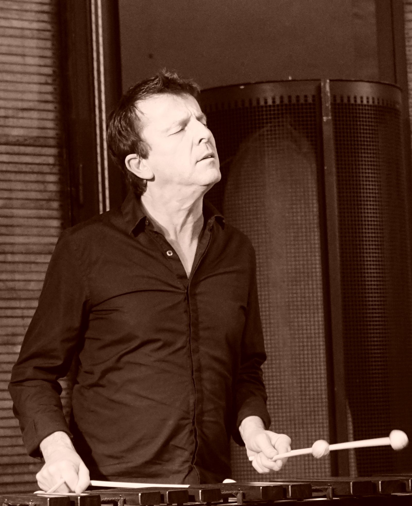 "singing fellows" à la Villa Douce.